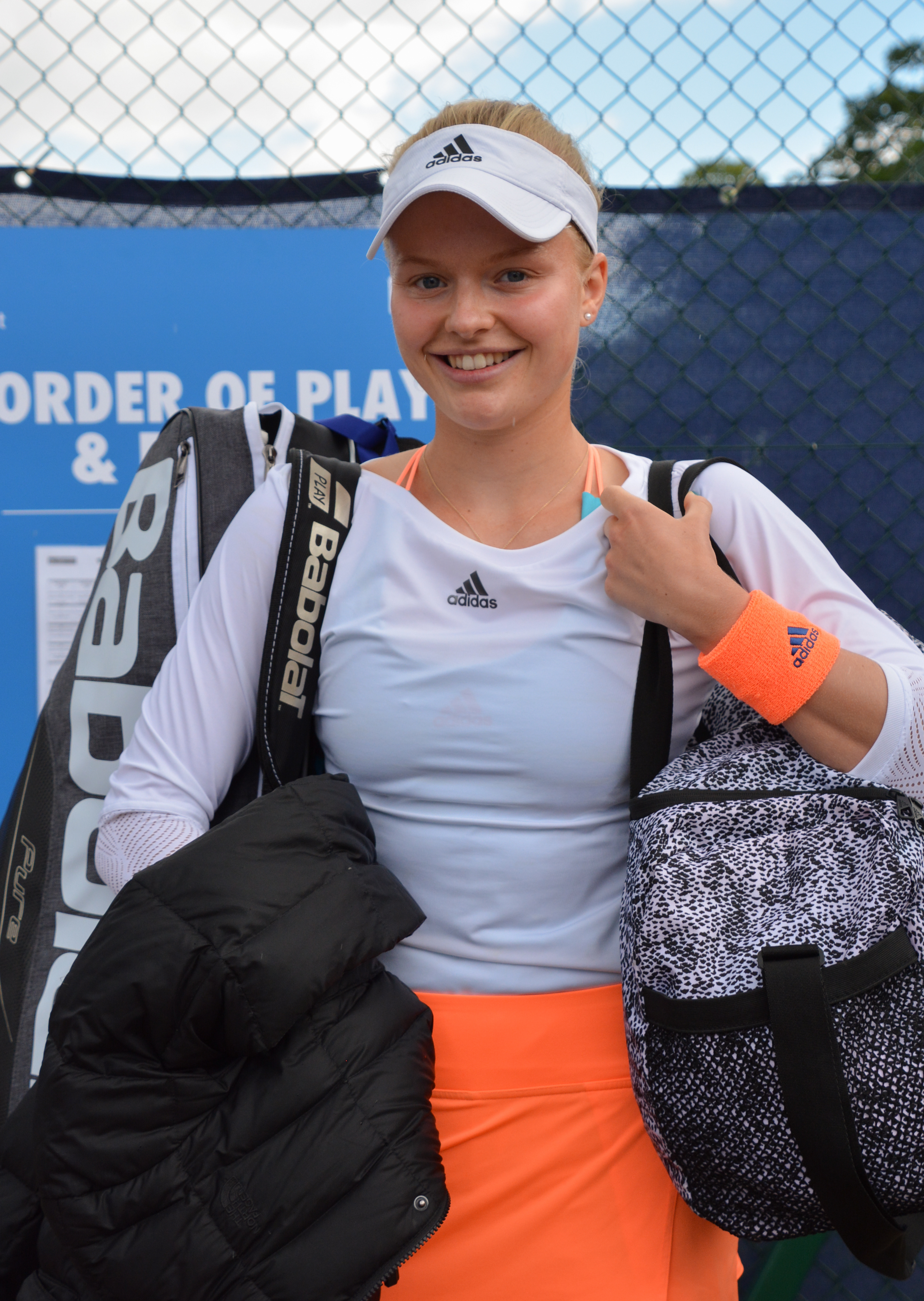 Surbiton, June 2017.